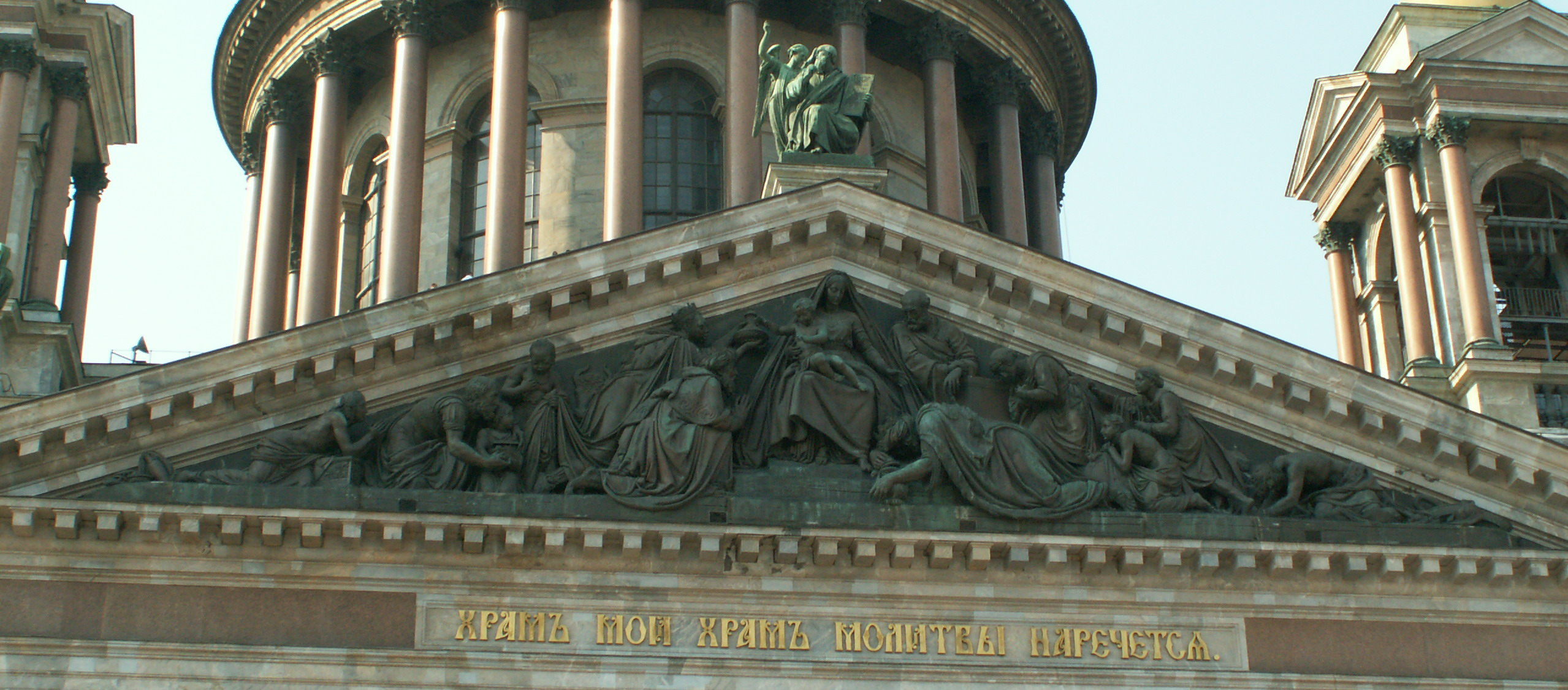 South front of Saint Isaac's cathedral. Saint Petersburg, Russia Южный фронтон Исаакиевского собора. Санкт-Петербург. Россия.